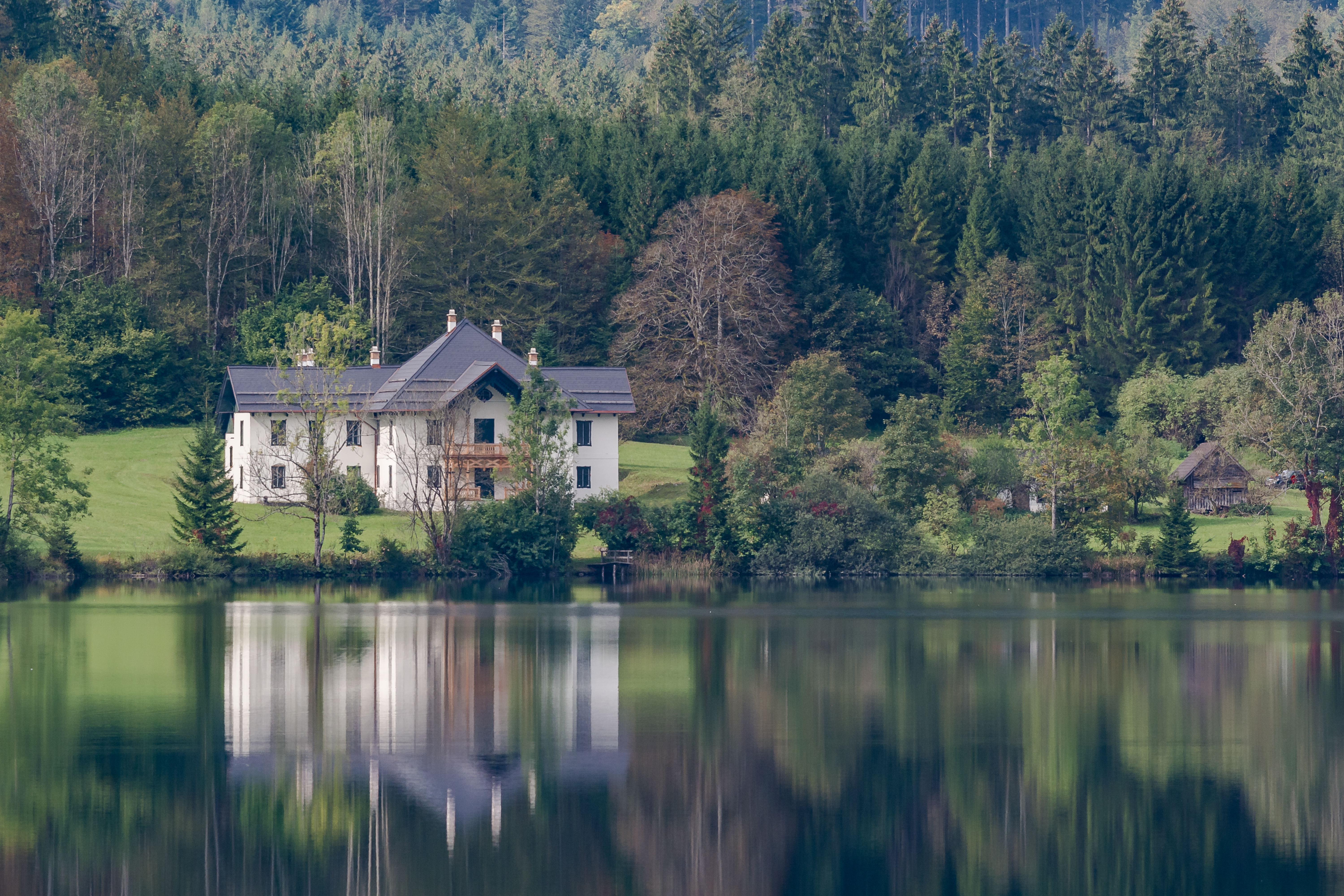 Das ehemalige kaiserliche Jagdschloss steht am westlichen Ufer des Vordern Langbathsees in Ebensee.